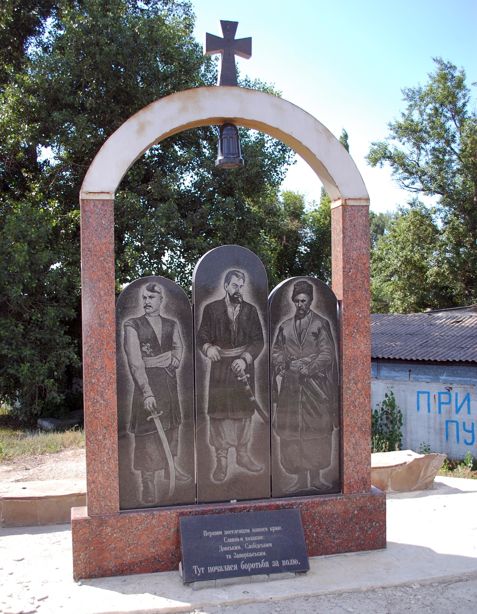 Шульгинка 2013-06-28 Луганська область, Україна